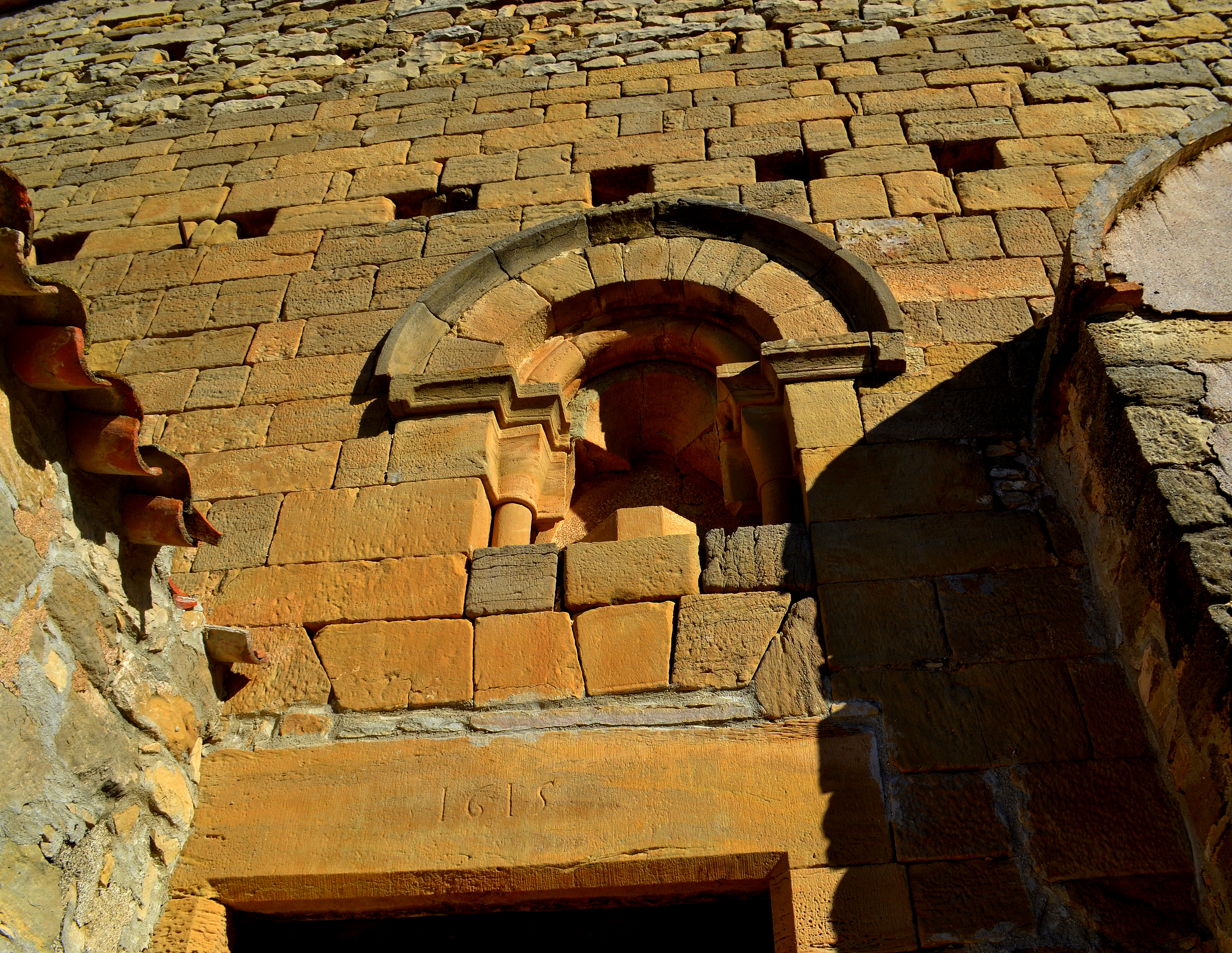 Església de Santa Maria (les Piles)